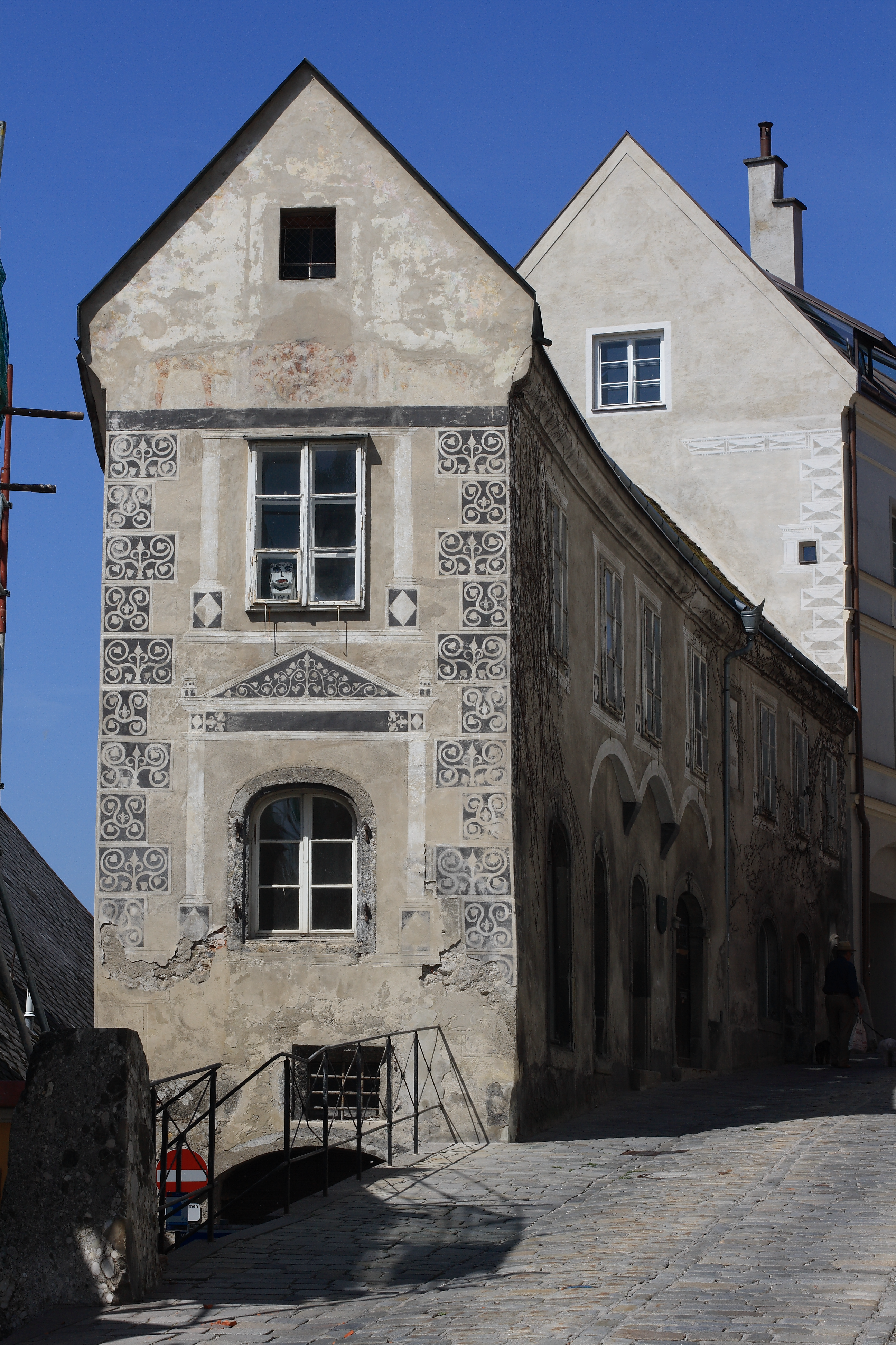 Das ehemalige Messererzechhaus in Steyr, Kirchengasse 1